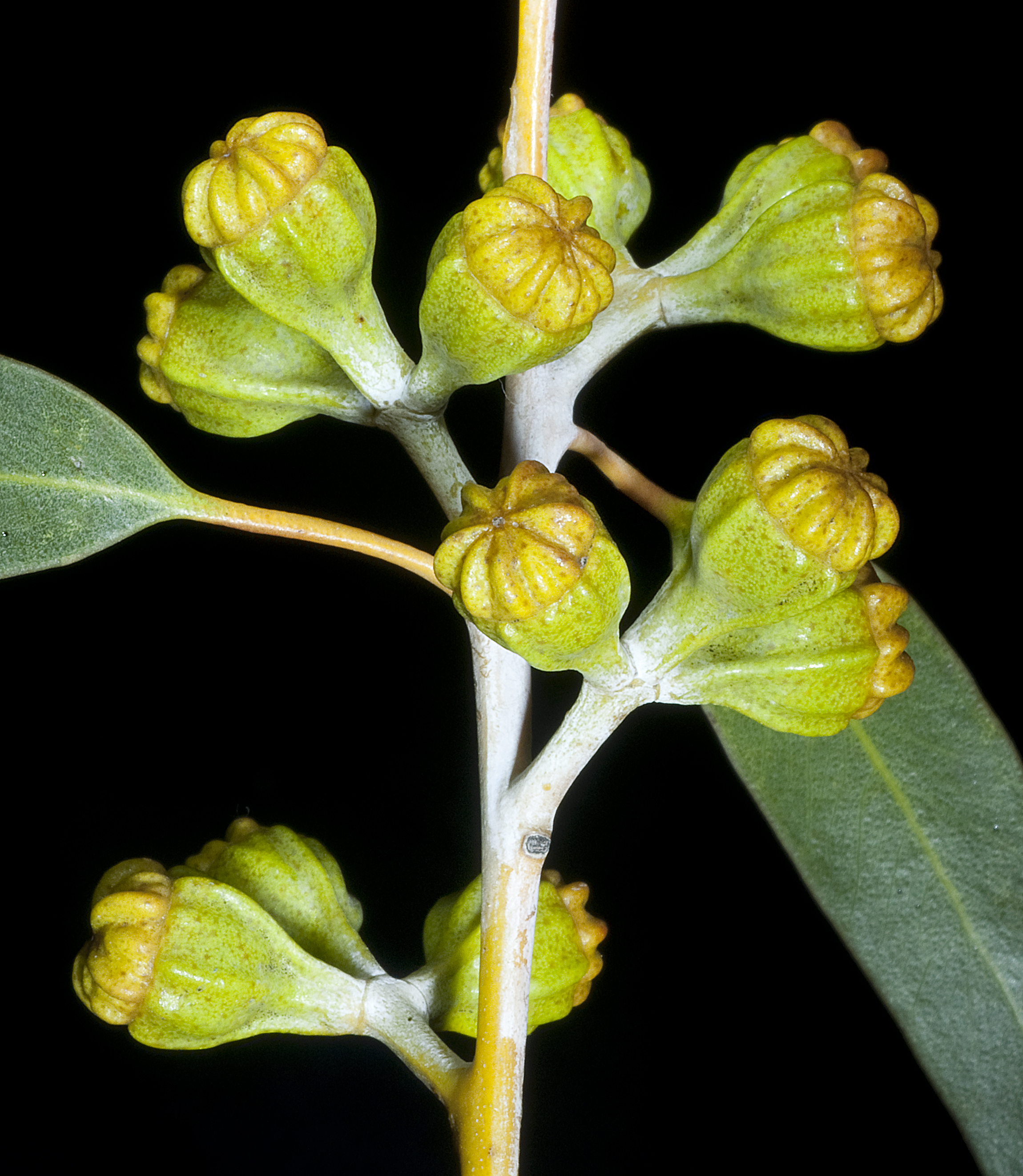 KRT4090